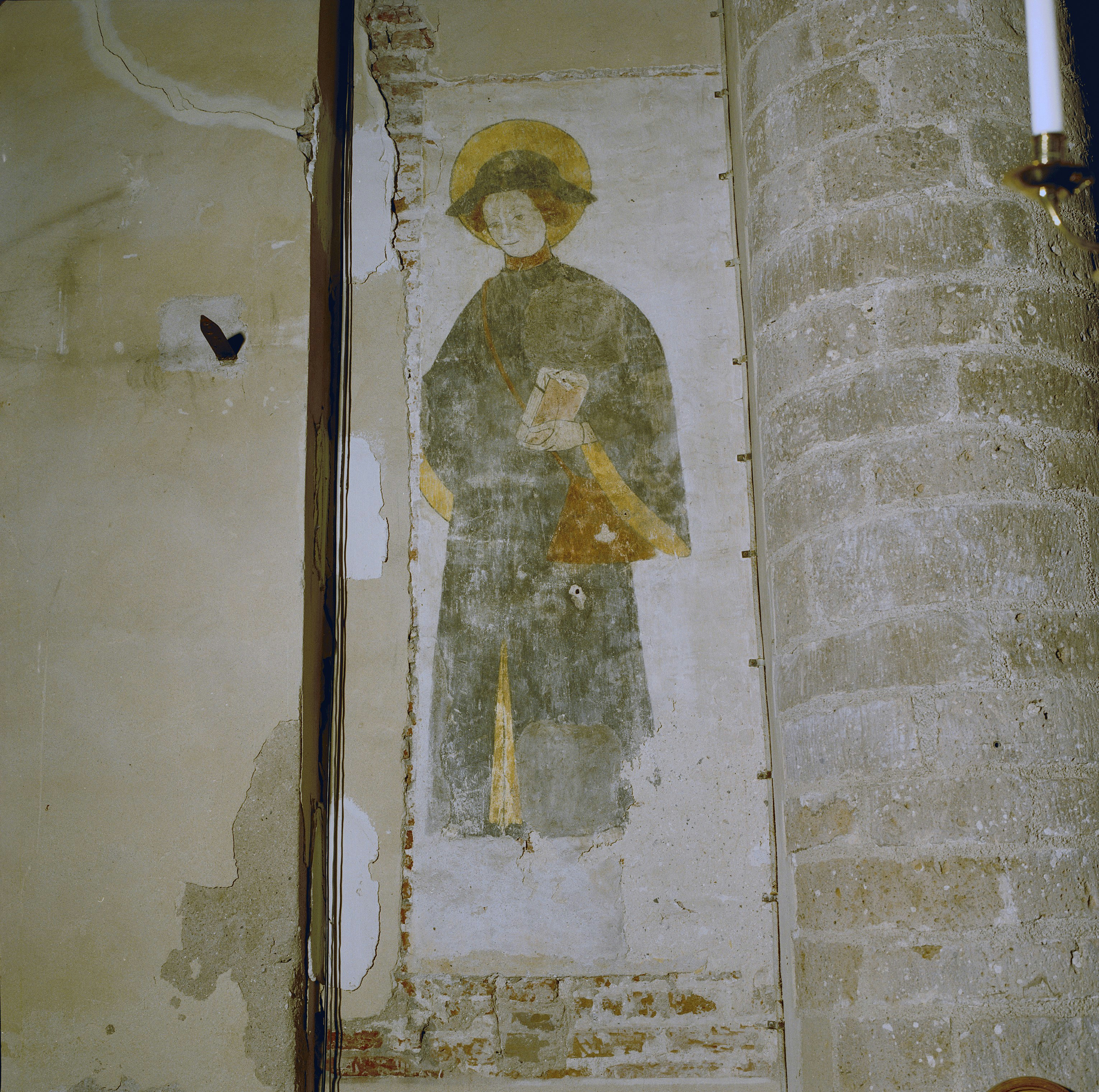 Nederlands Hervormde Kerk: INTERIEUR, SCHIP, MUURSCHILDERINGEN (13)